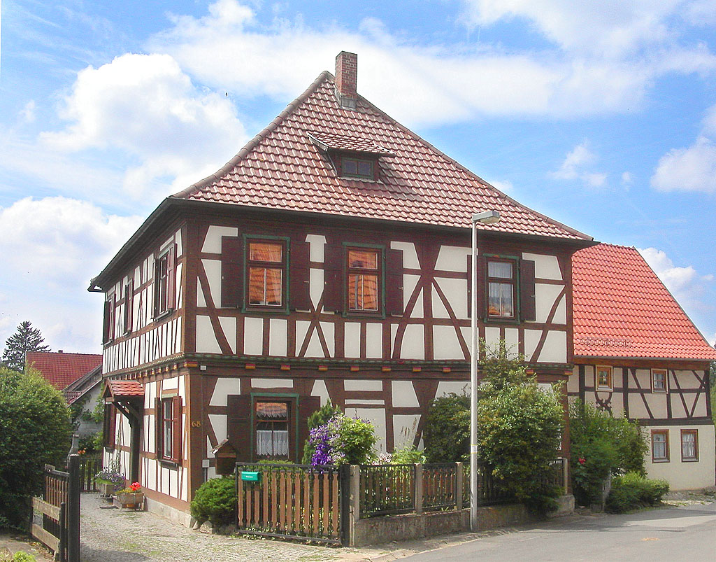 Hennebergisch-fränkisches Fachwerk in Nordheim (Thüringen)